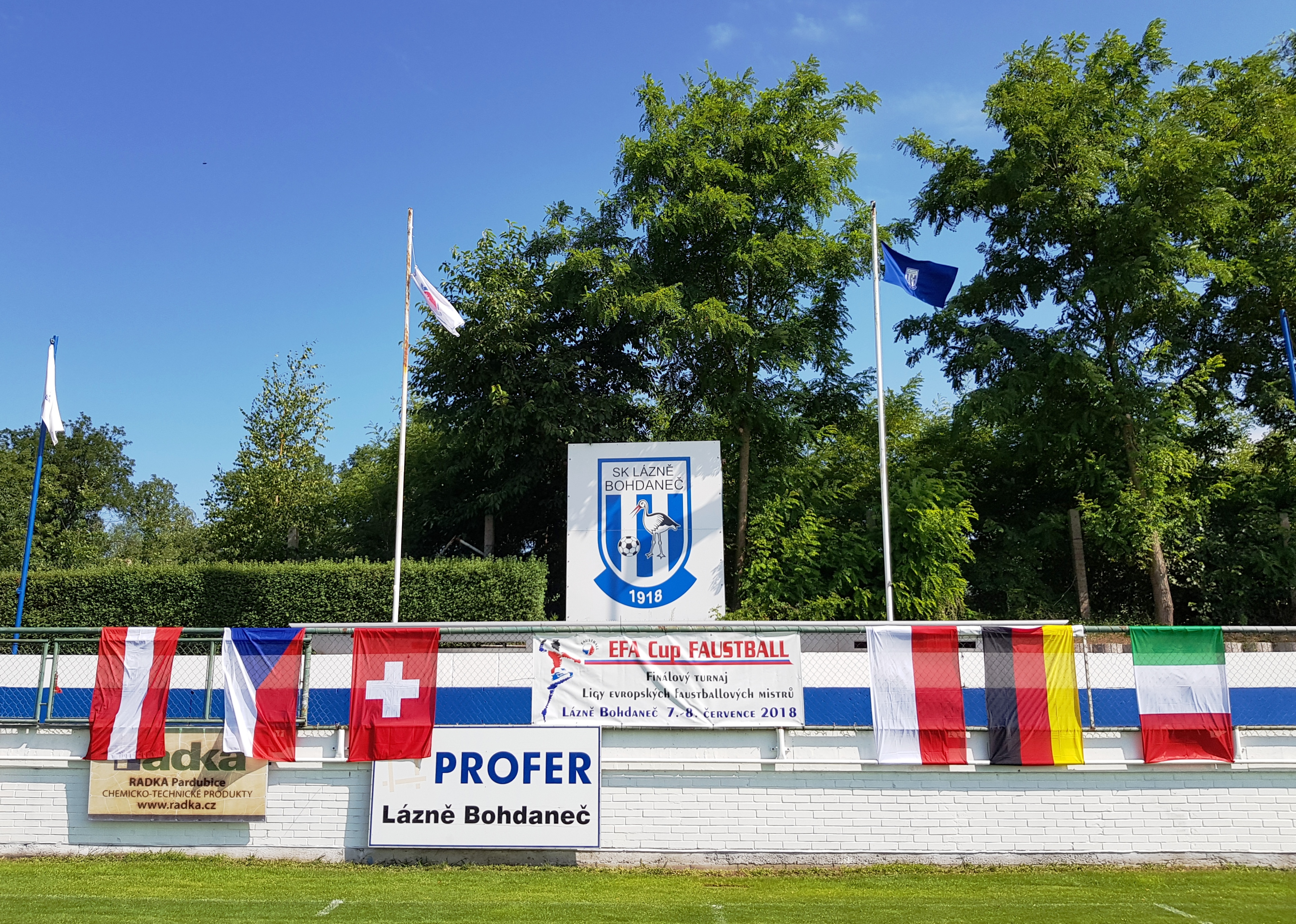 EFA Cup Flaggen und Fahnen der teilnehmenden Länder